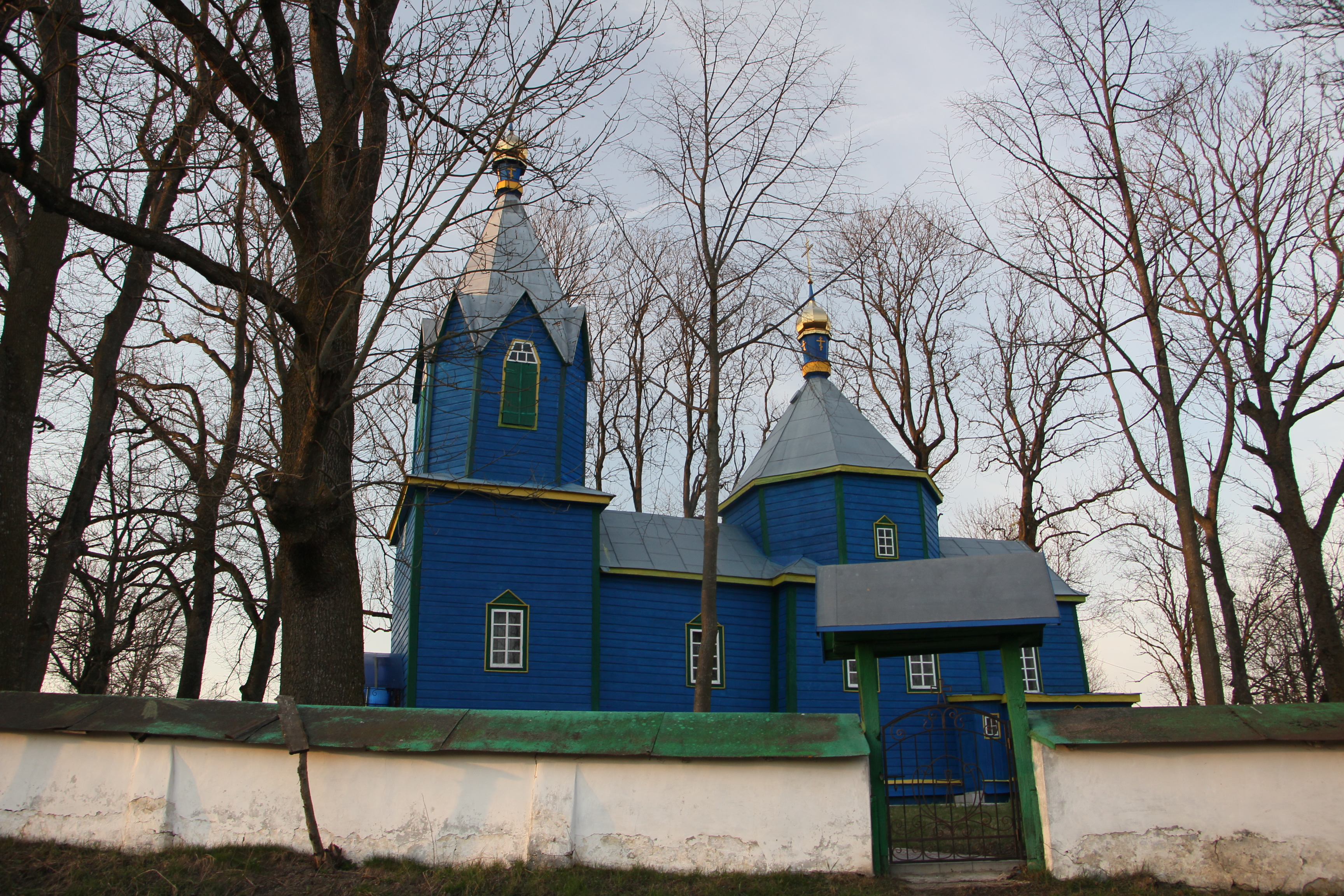 Дерев'яна церква в селі Печірна Лановецького району, Тернопільської області